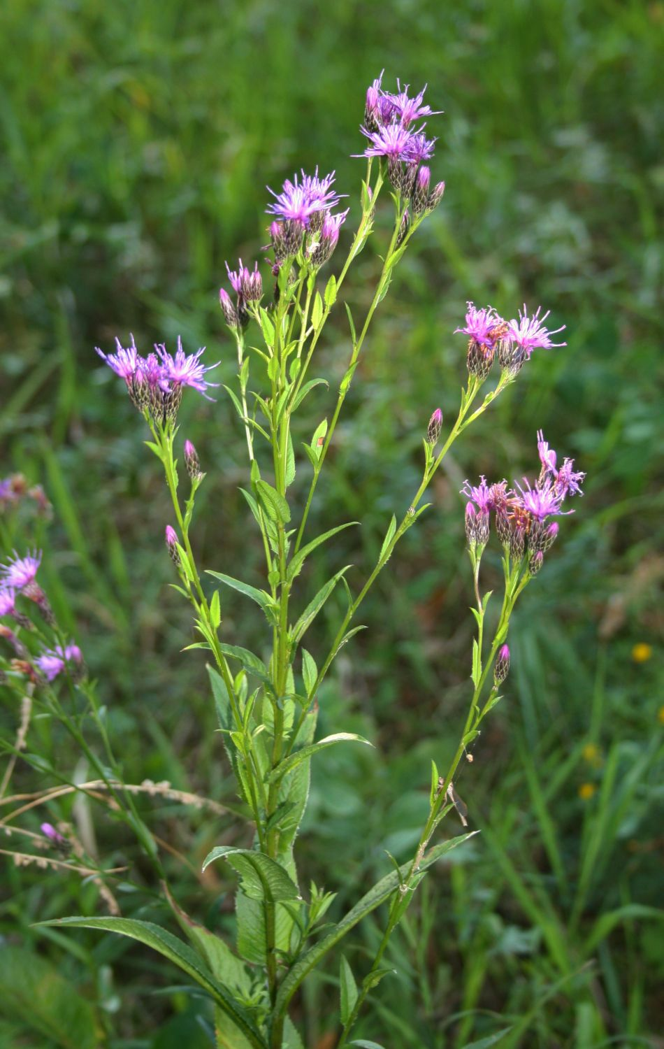 Gewöhnliche Färberscharte (Serratula tinctoria subsp. tinctoria), Korbblütler (Asteraceae) - Österreich/Austria/Autriche: Niederösterreich, Alpenostrand, Glaslauterriegel ca. 1.8 km SW Gumpoldskirchen